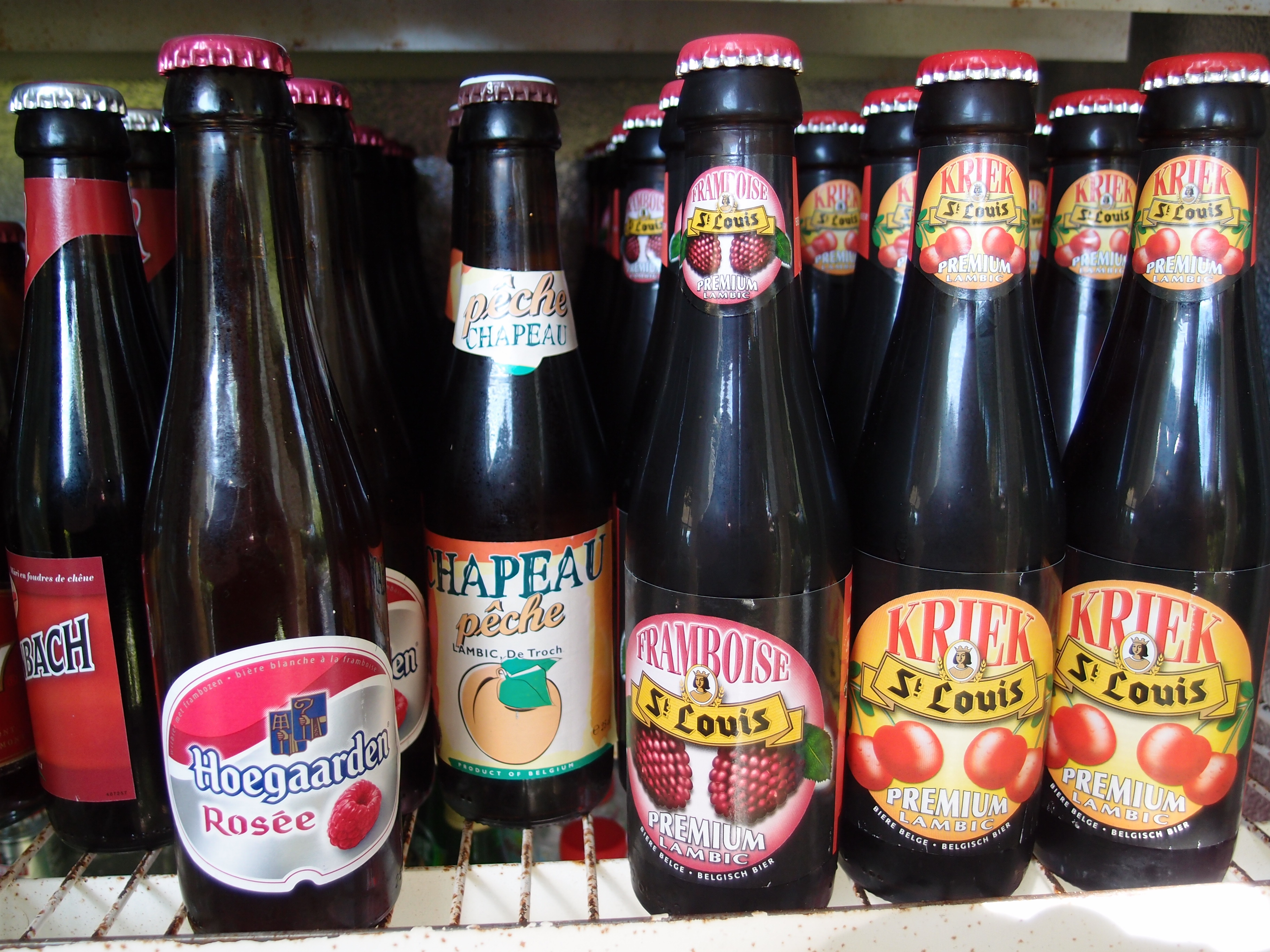 Einige belgische Lambic-Biere Datum: 25.09.2011 Urheber: M. Pfeiffer alias Benutzer:Gordito1869 Quelle: Privates Fotoarchiv des Urhebers